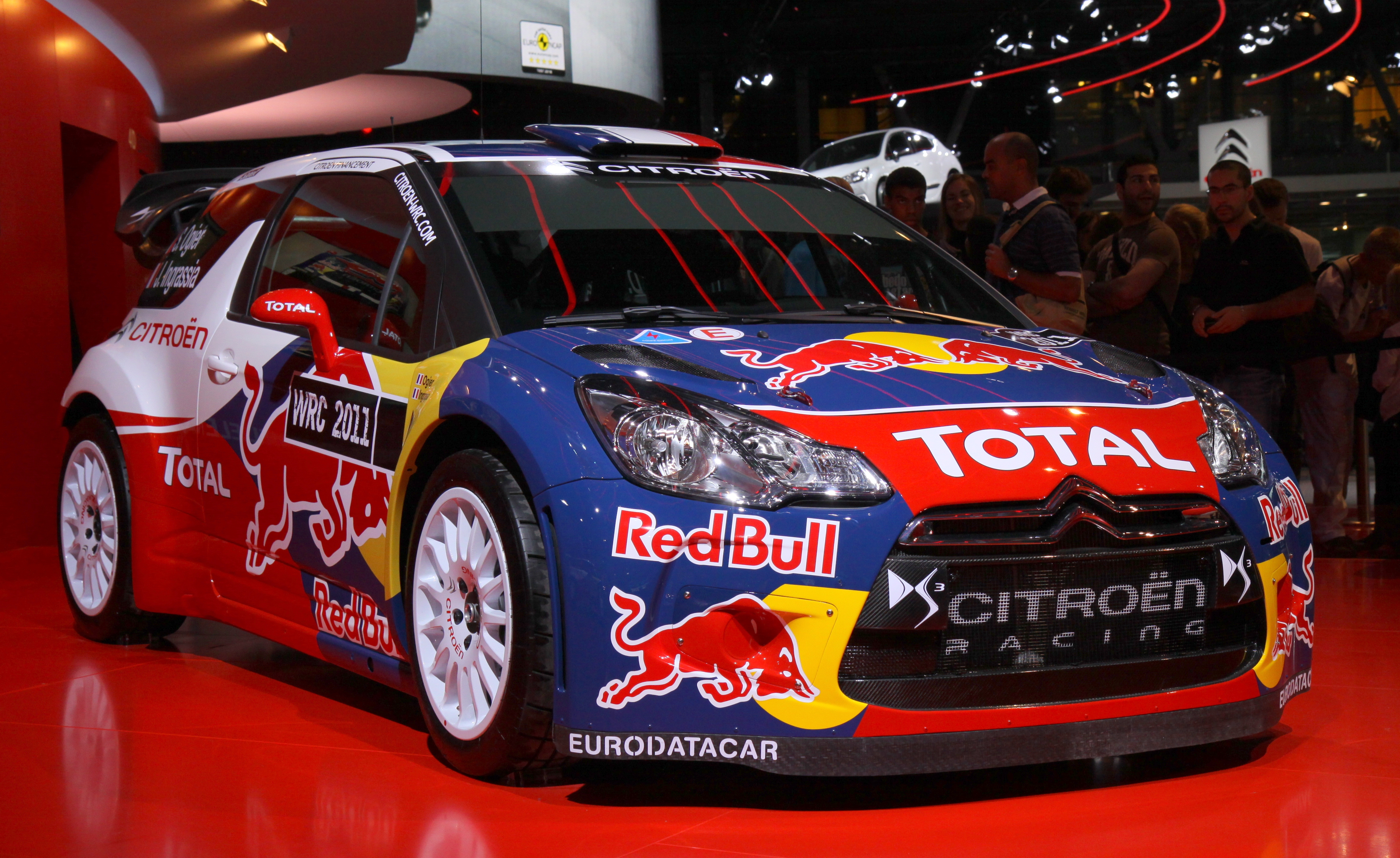 Závodní Citroën DS3 WRC na autosalonu Mondial de l’Automobile de Paris